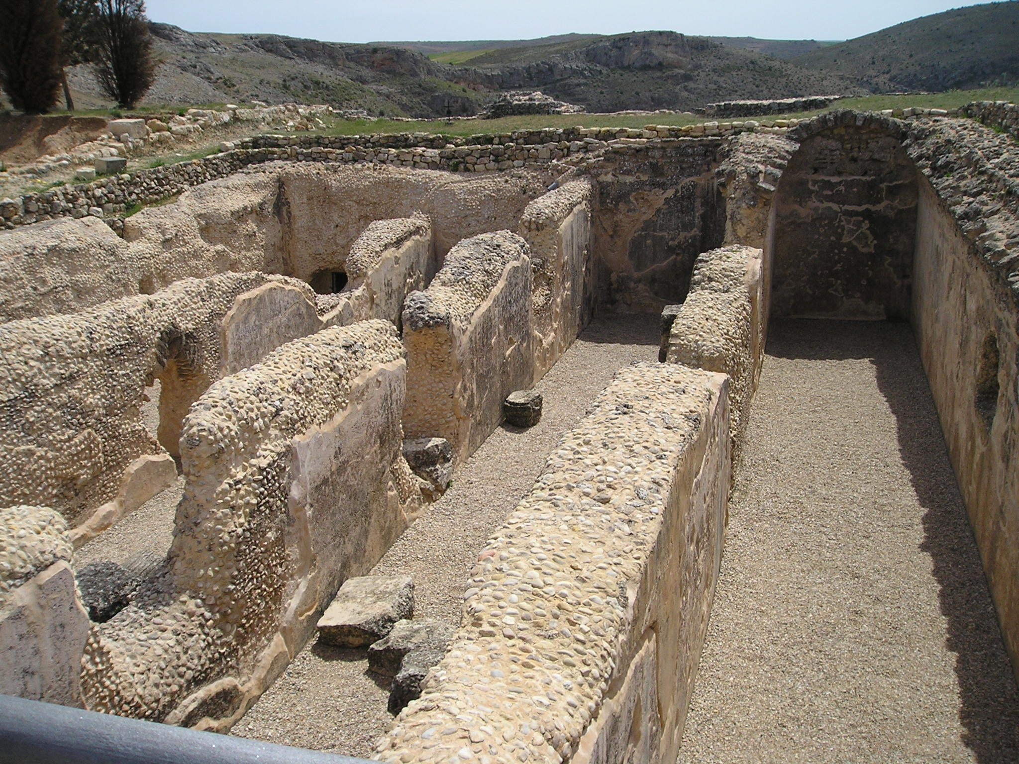 Cisternas de época del emperador romano Claudio, construidas bajo el pavimento del foro de la ciudad romana de Valeria (Valeria, Valera de Abajo, Cuenca España)